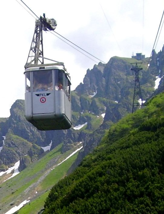 kolejka linowa na Kasprowy Wierch